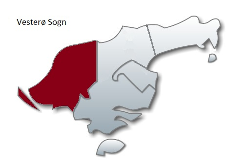 Vesterø Sogn på Læsø.